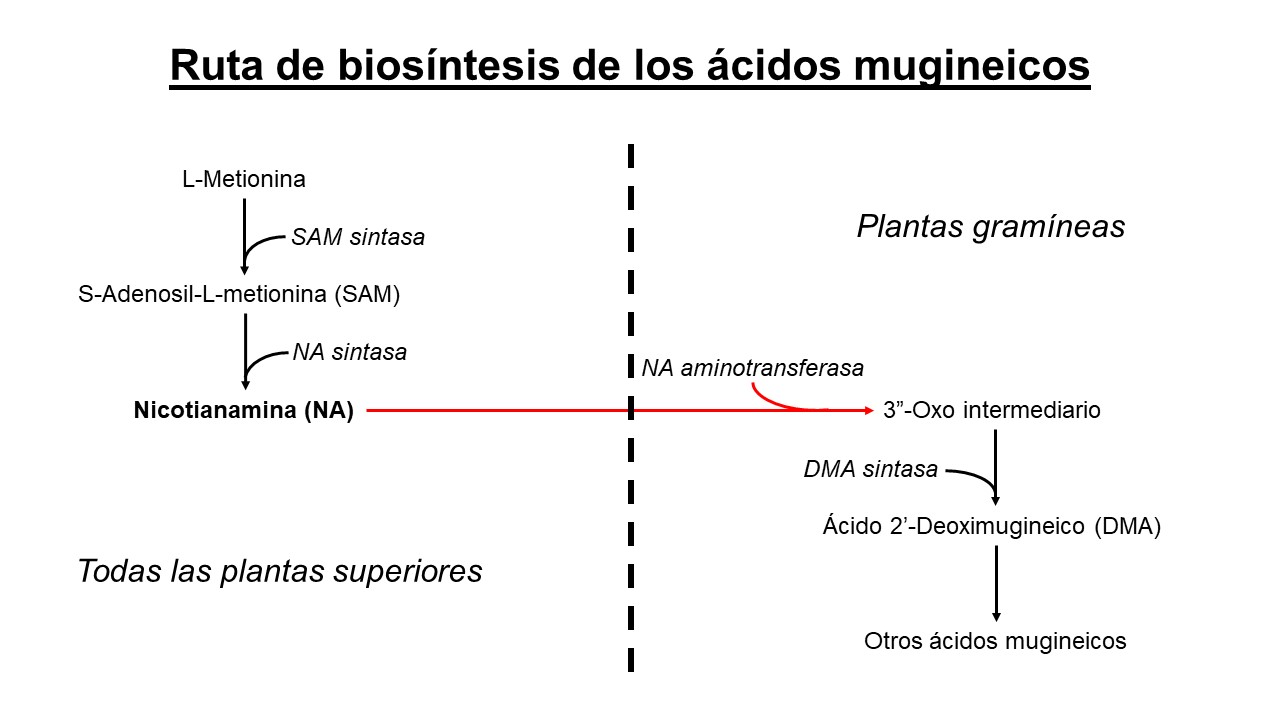 Ruta de Biosíntesis de los Ácidos Mugineicos a partir de la L-Metionina, incluyendo las enzimas que participan y especificando las etapas específicas de las plantas gramíneas